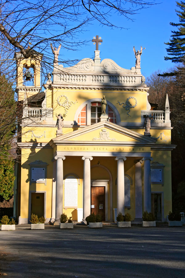 Santuario della Madonna della Bocciola ad Ameno